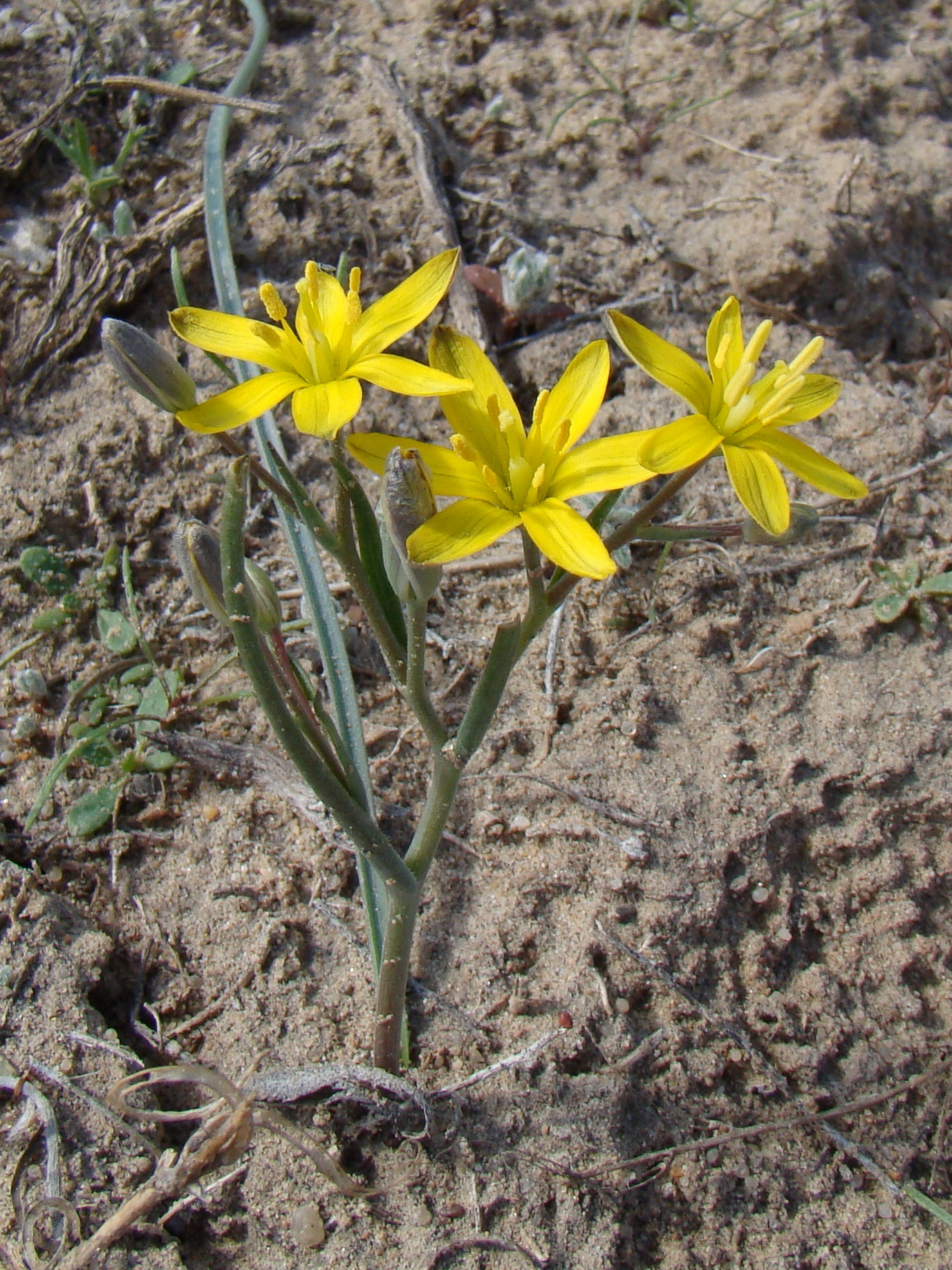 Гусиный лук (Gagea altaica). Окрестости города Байконур, Казахстан